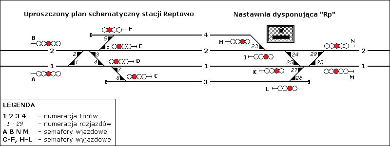 Stacja Reptowo - uproszczony plan schematyczny